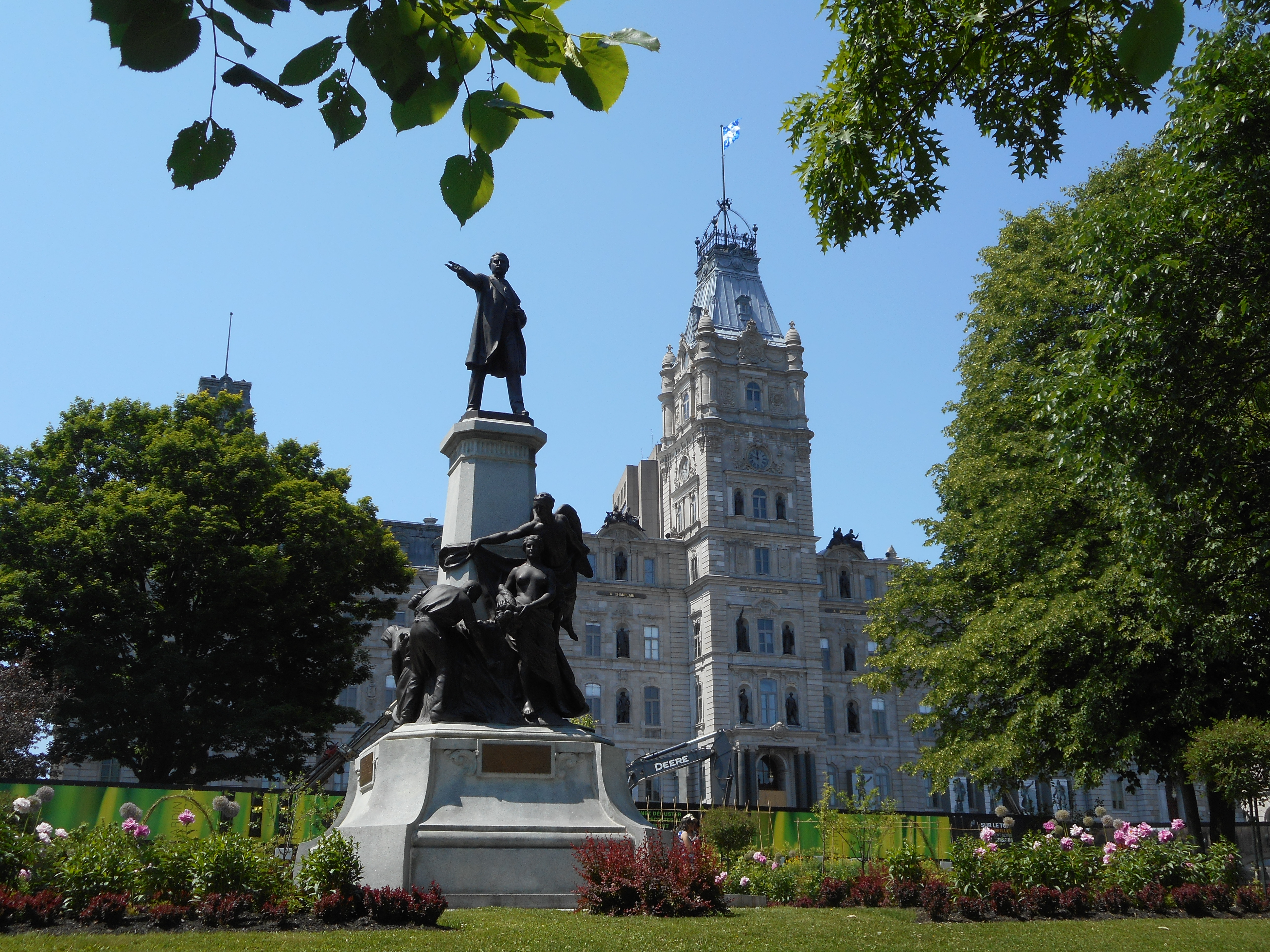 Monument Honoré-Mercier, devant l'hôtel du Parlement du Québec